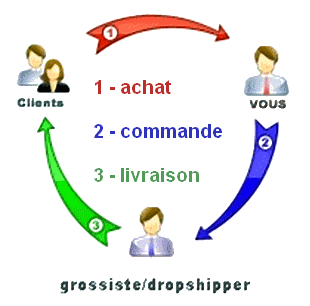 Principe du Drop-Shipping : Le client achète chez vous. Vous passez la commande au fournisseur Le fournisseur livre le client...